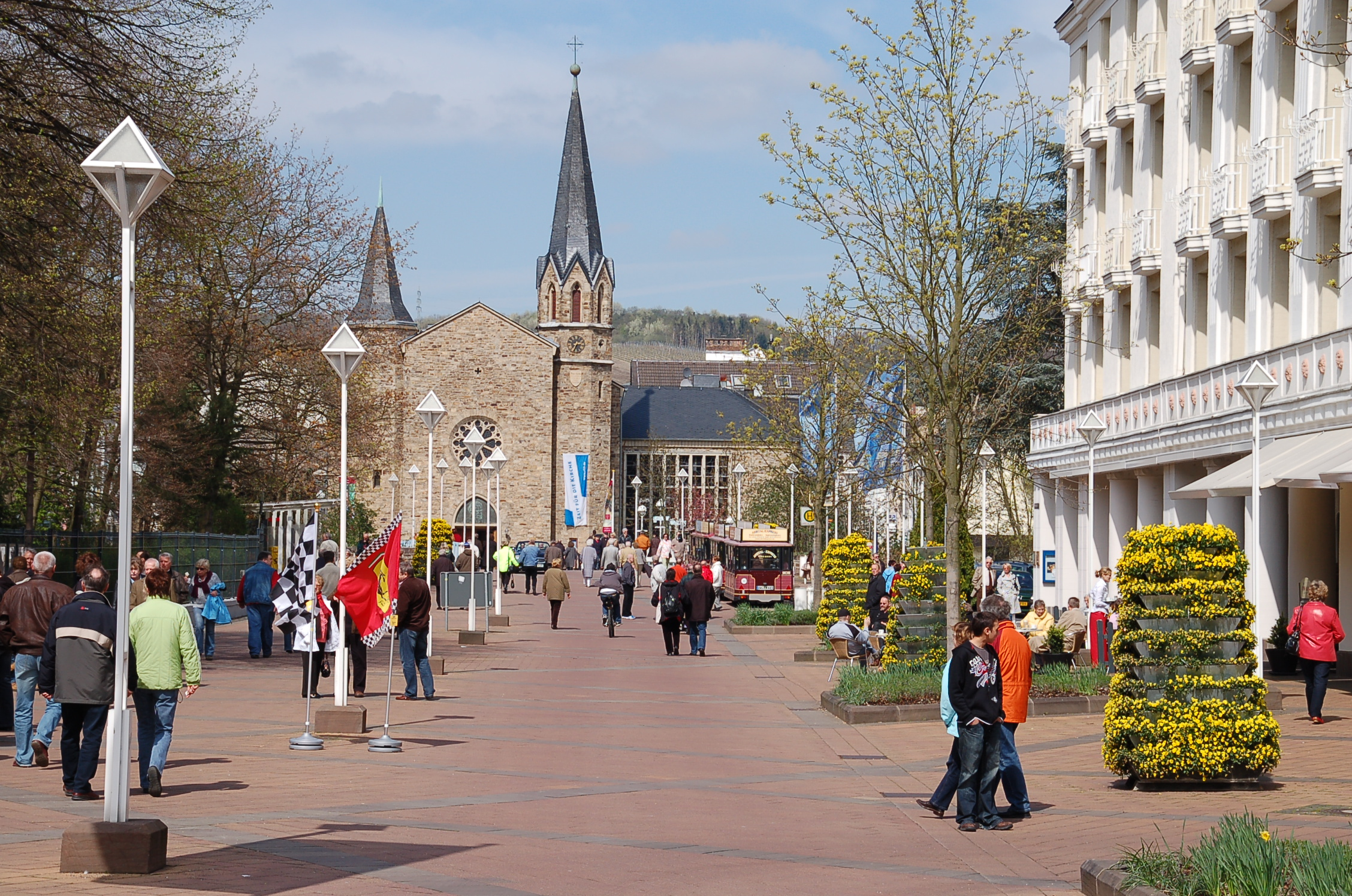 Blick auf die Martin-Luther-Kirche in Bad Neuenahr